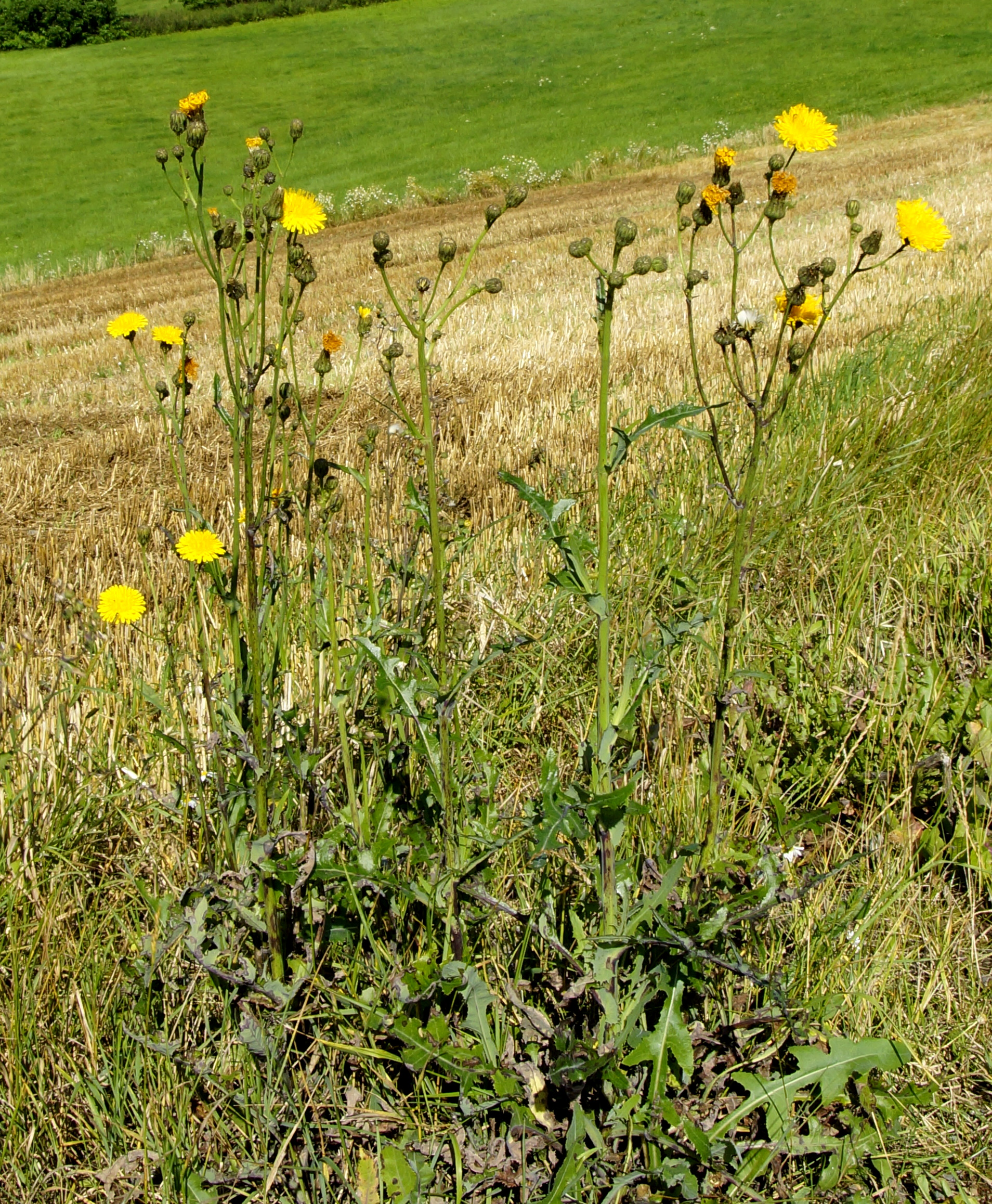 Acker-Gänsedistel, Asteraceae, Deutschland, Bayern, Oberfranken, Selbitz Foto: U.Schmidt, 2.VIII.2012